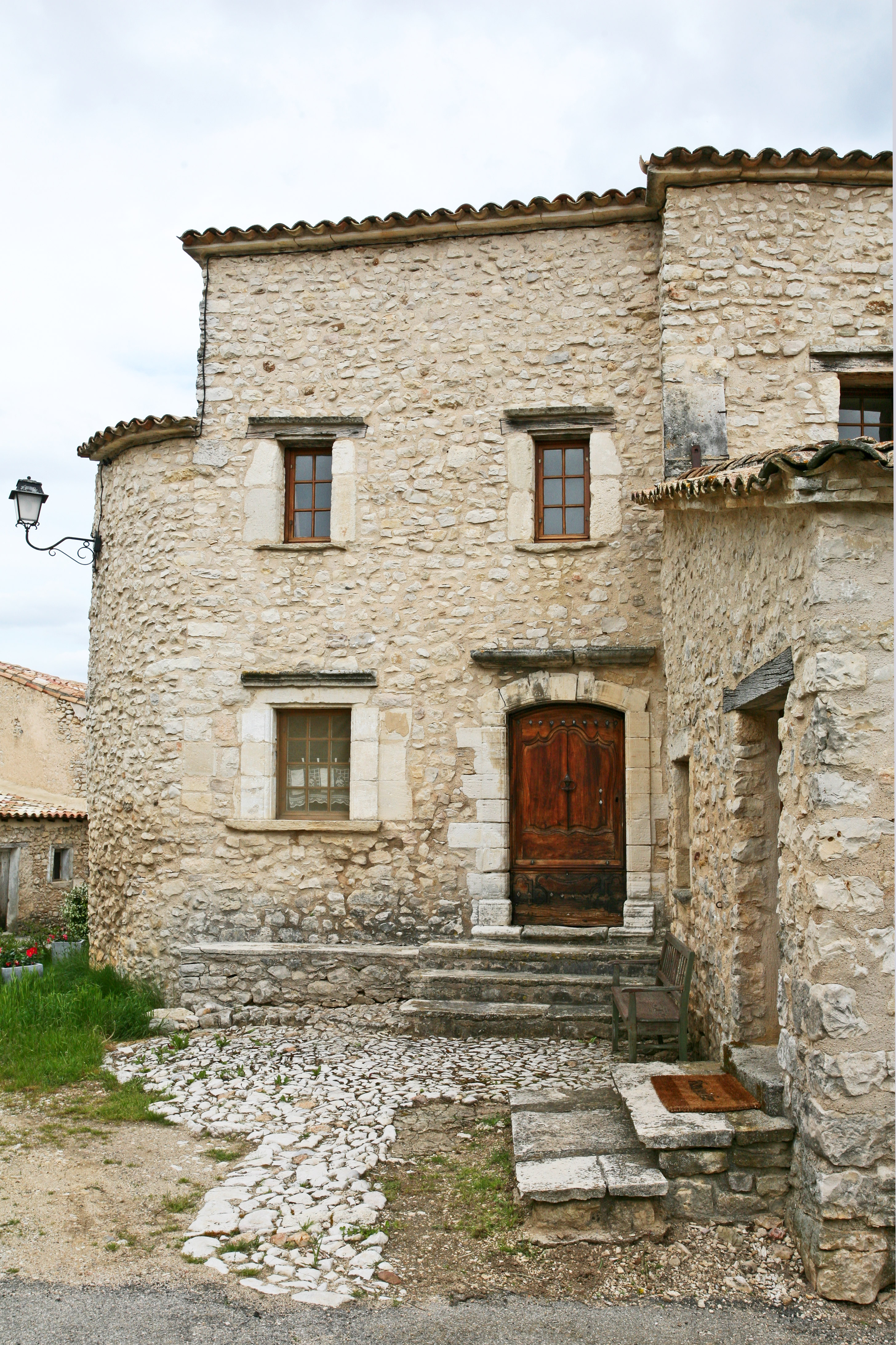 Maison à Saint-Trinit (Vaucluse)